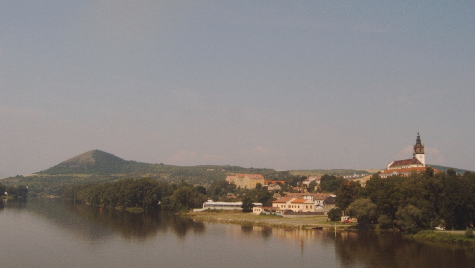 Blick auf Litoměřice von der Brücke über die Elbe Aufnahme: August 2005 Url